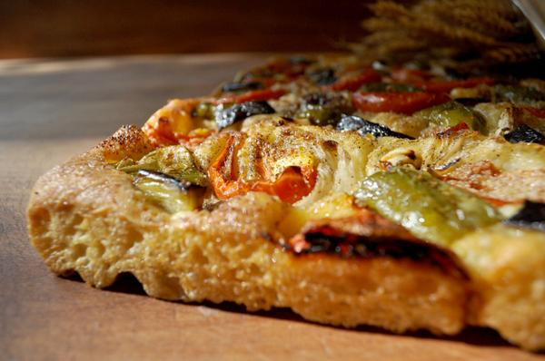 Pizza